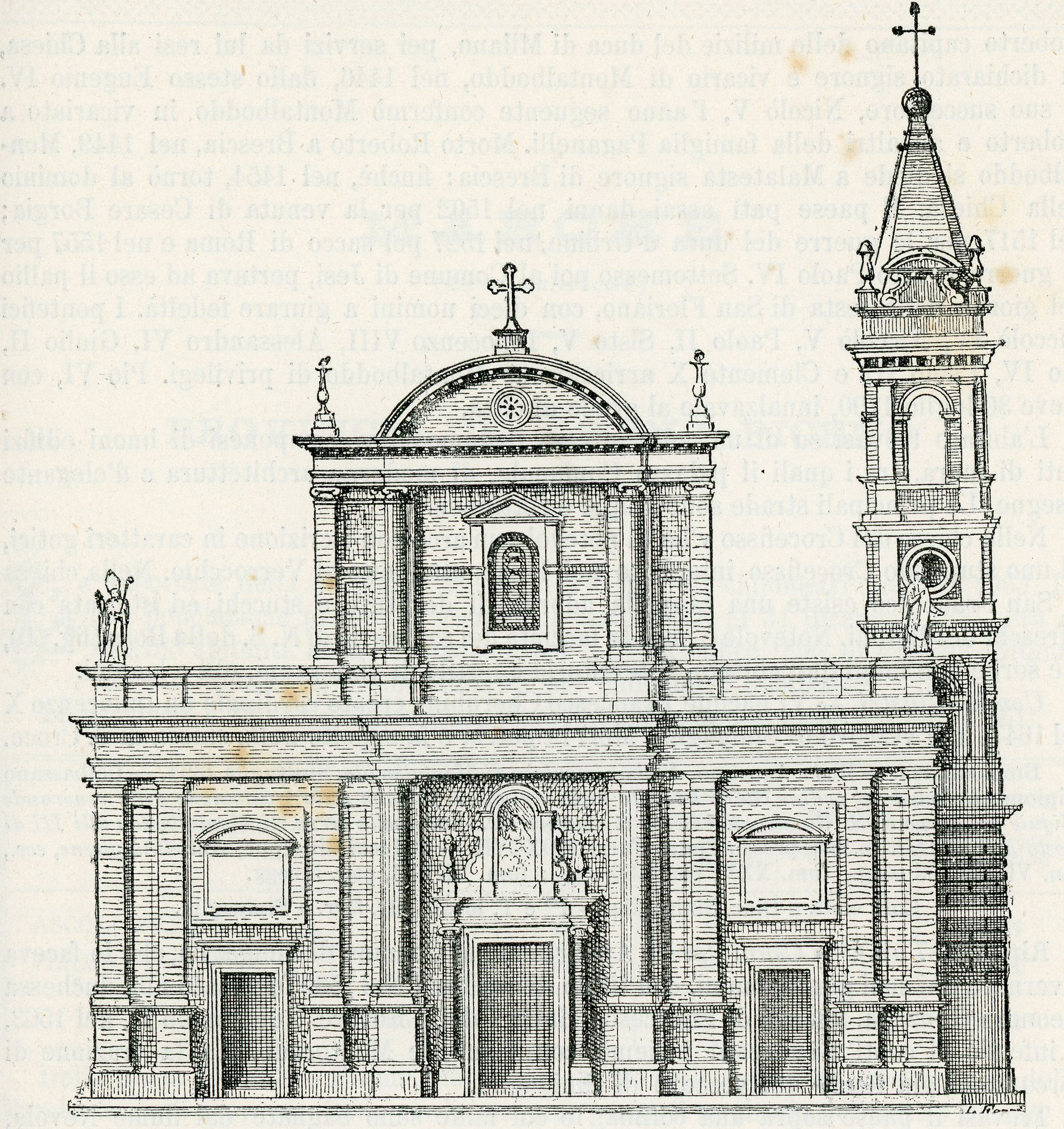 Ostra: Santuario di Nostra Signora della Rosa